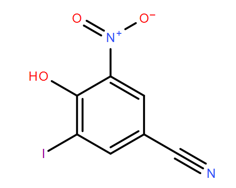 Nitroxinil